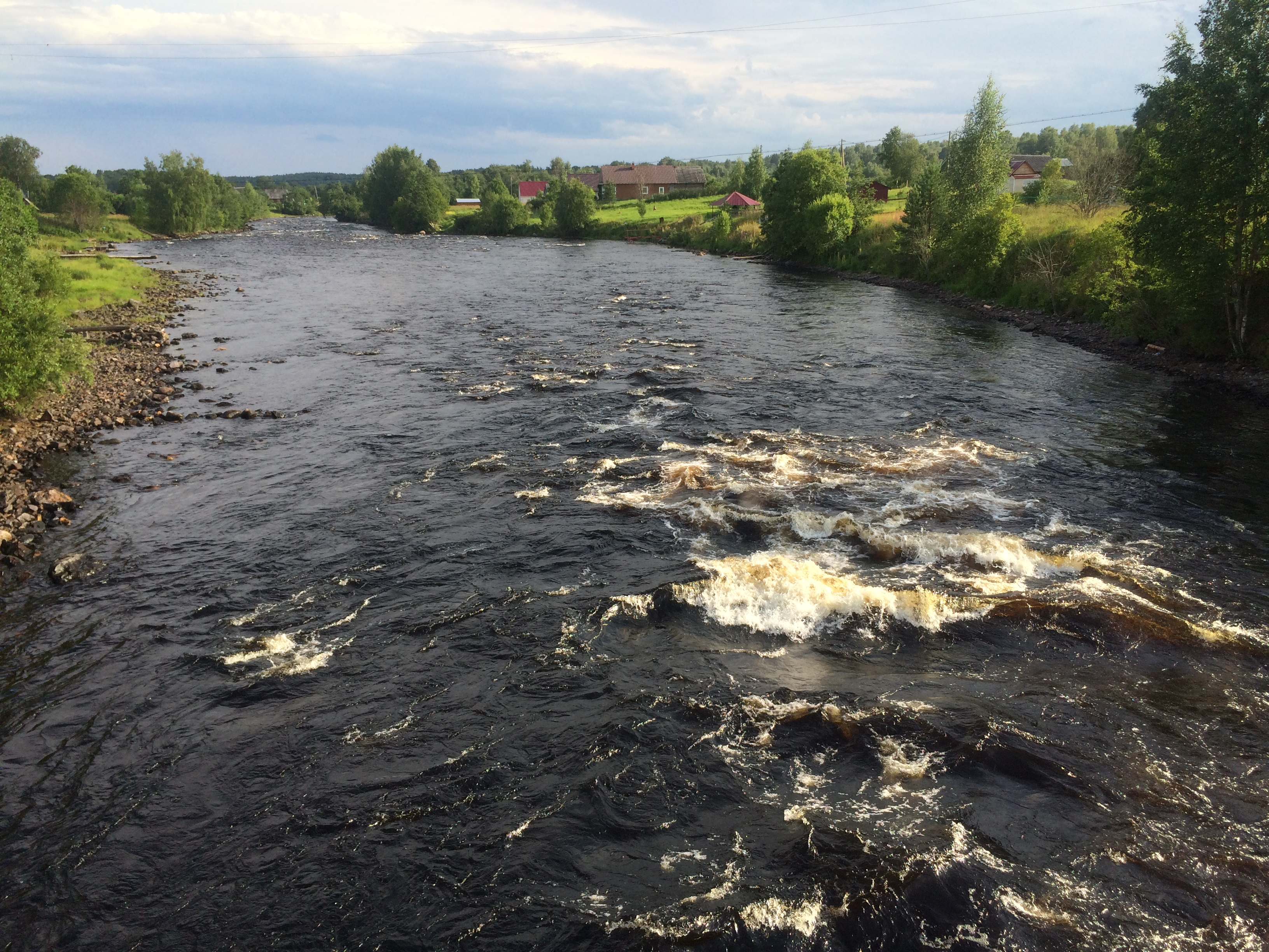 Тивдия (река)